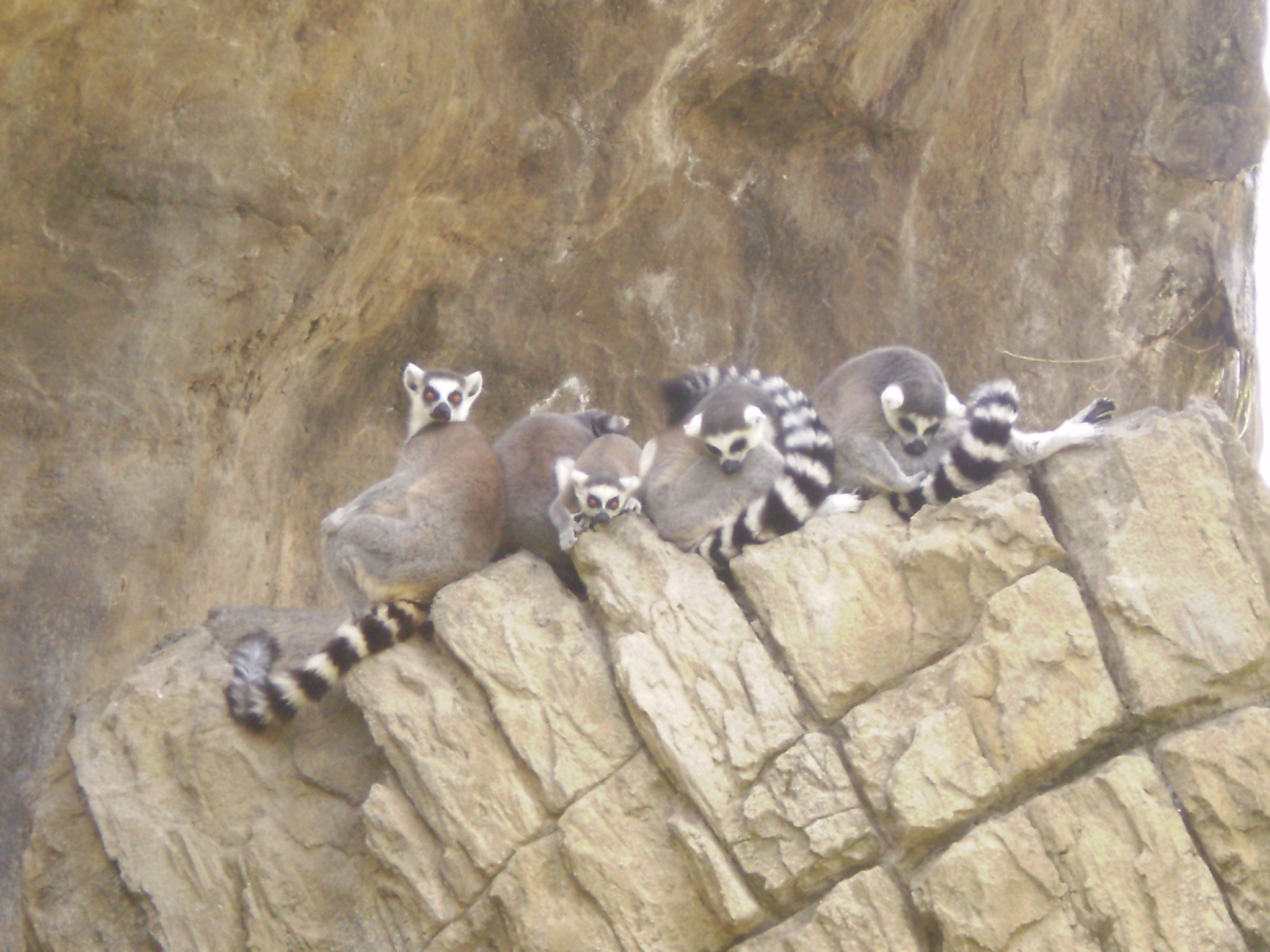 Bioparc - Lemures en la Isla de los Lemures en la seccion Madagascar